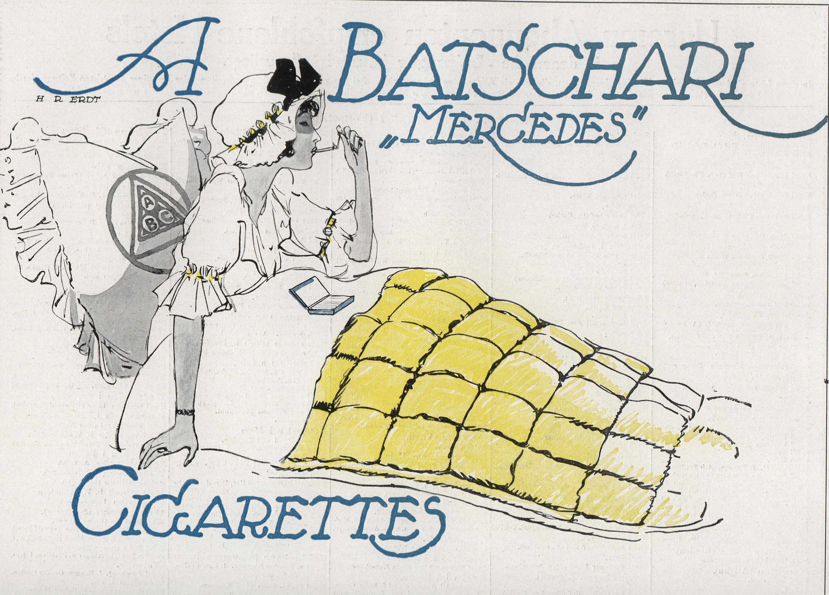 Reklameanzeige für Batschari Zigaretten